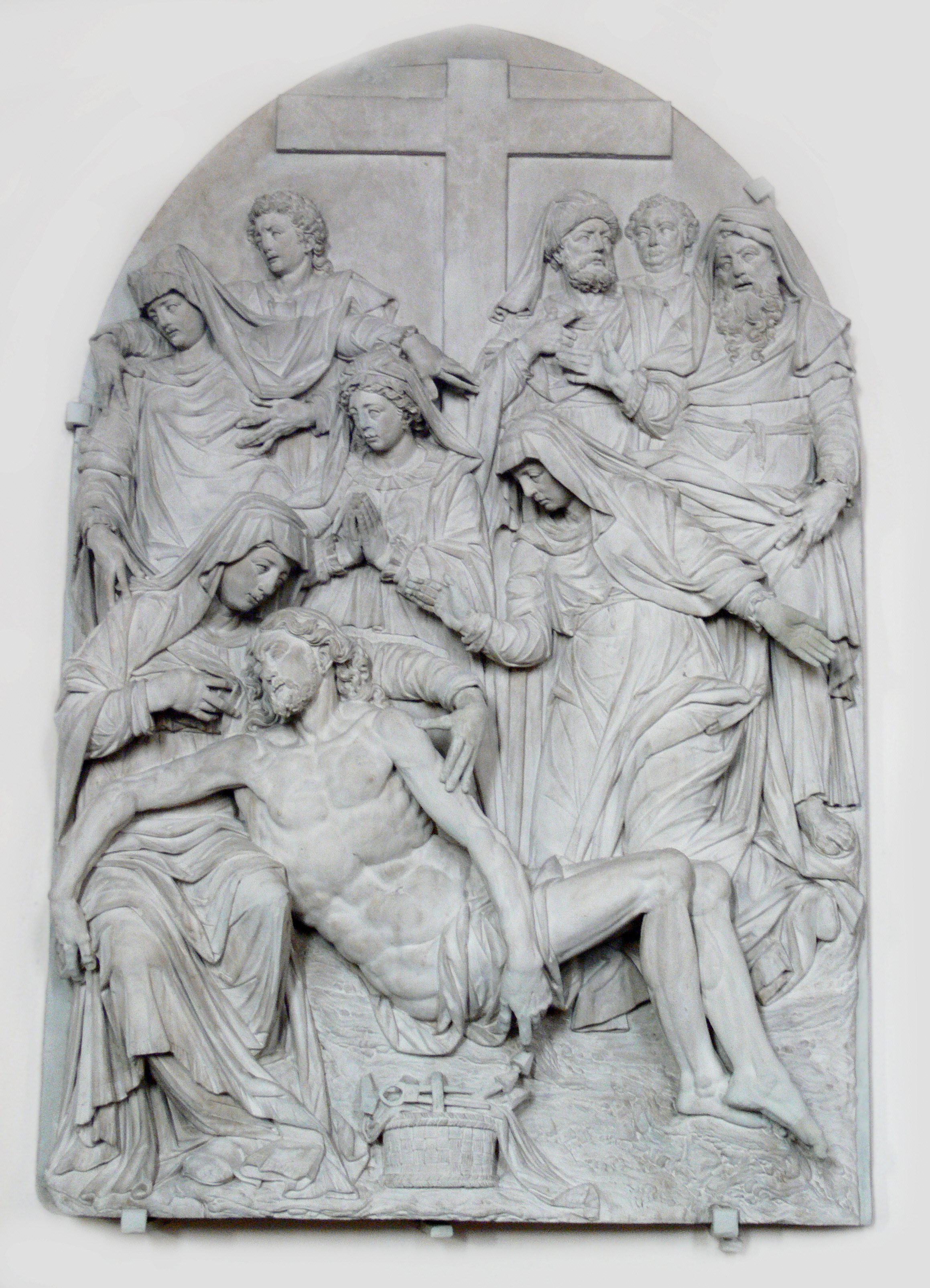 Hepbach (Ortsteil von Markdorf), Bodenseekreis, Baden-Württemberg Pfarrkirche St. Sigismund Relief von Hans Morinck (1555–1616): Beweinung Christi, 1596/1597, früher im Kreuzgang von Kloster Peterhausen (Konstanz); 1852 für Hepbach erworben